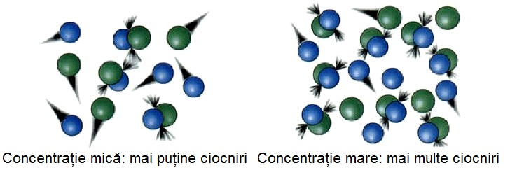 Dependența vitezei de reacție de concentrație